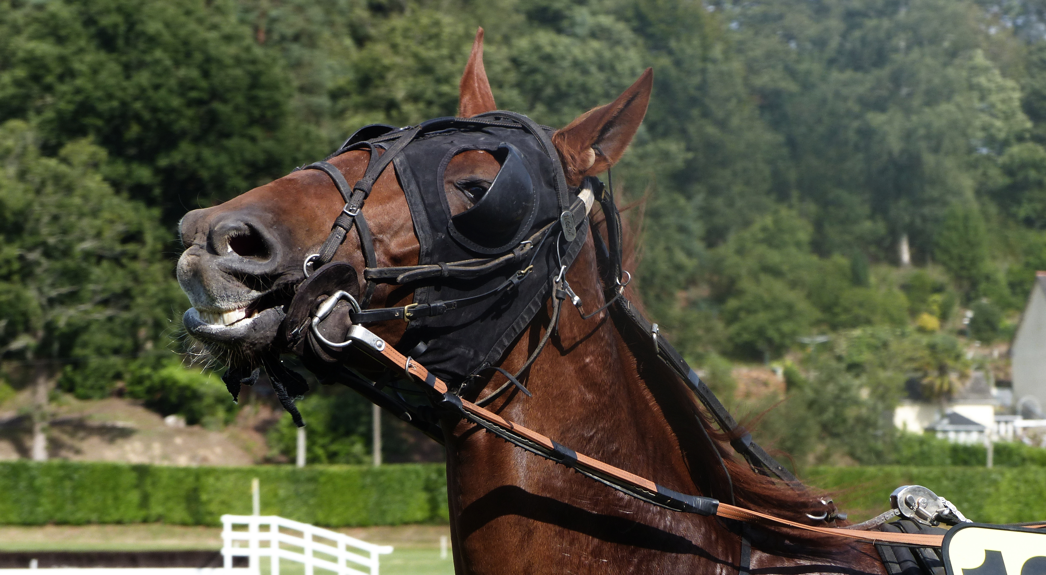 Tête d'un cheval de couleur rousse avec des lanières